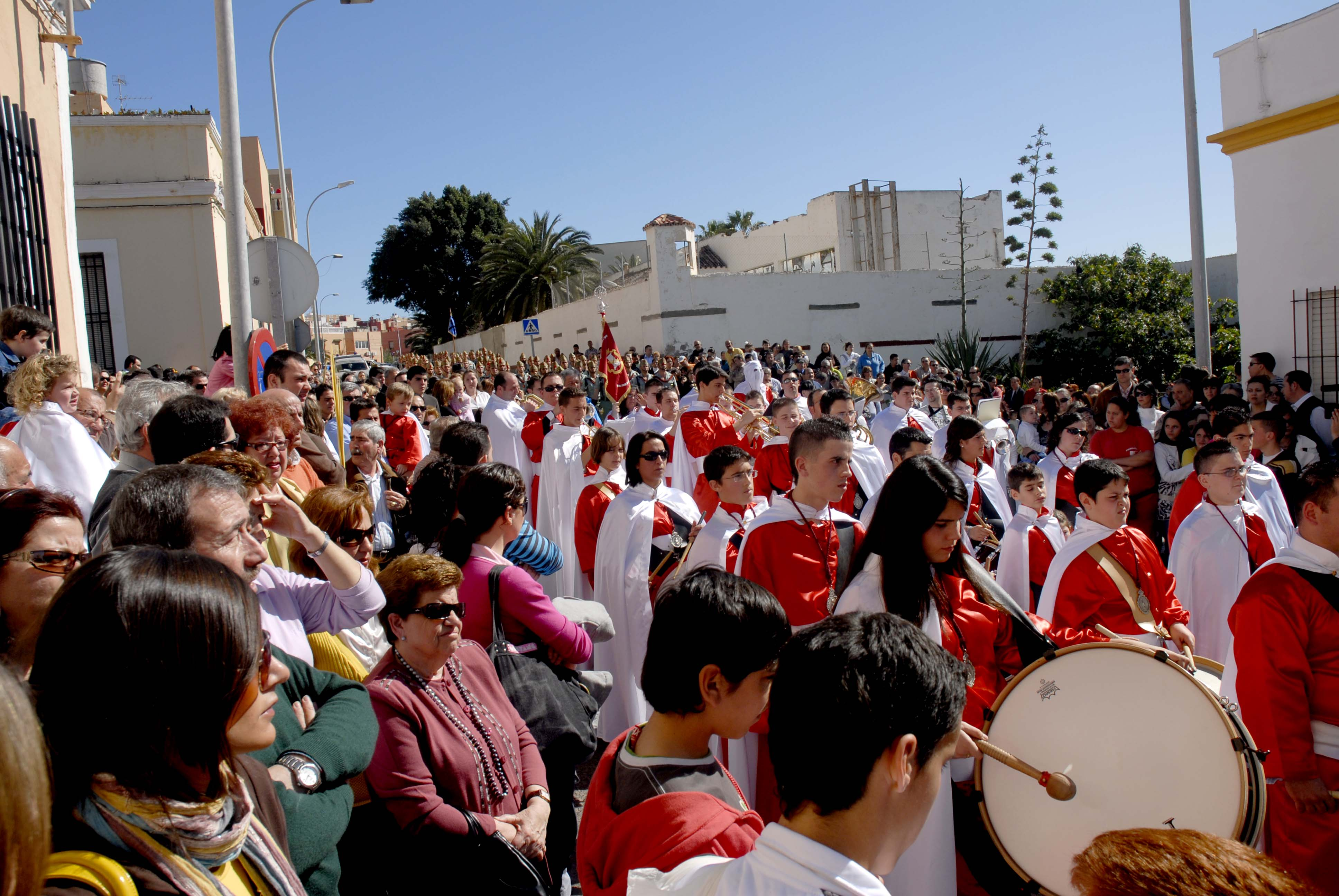 Melilla en Semana Santa (54)